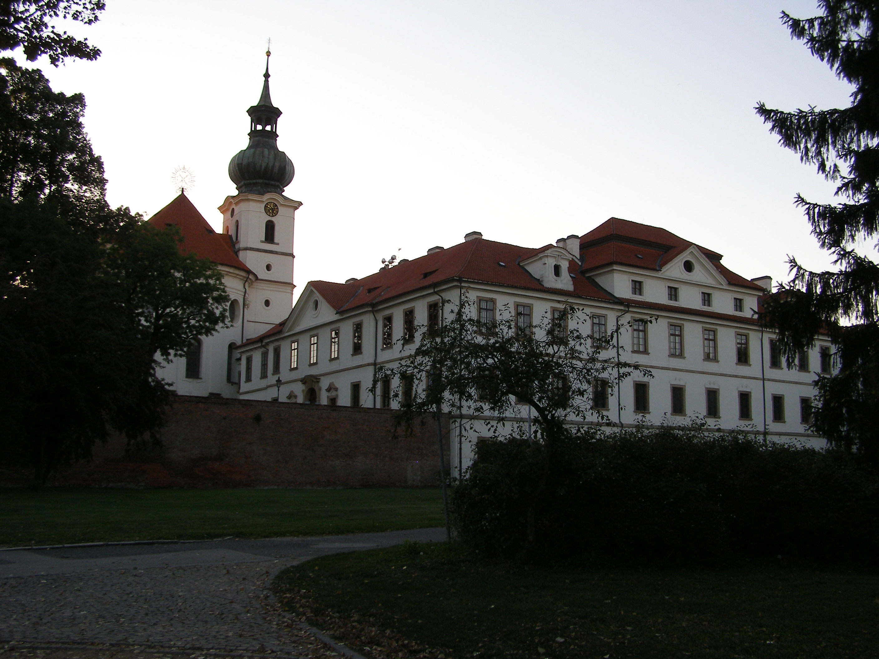 Klášter Břevnovský (Břevnov), Praha 6, Markétská 1/28, Břevnov